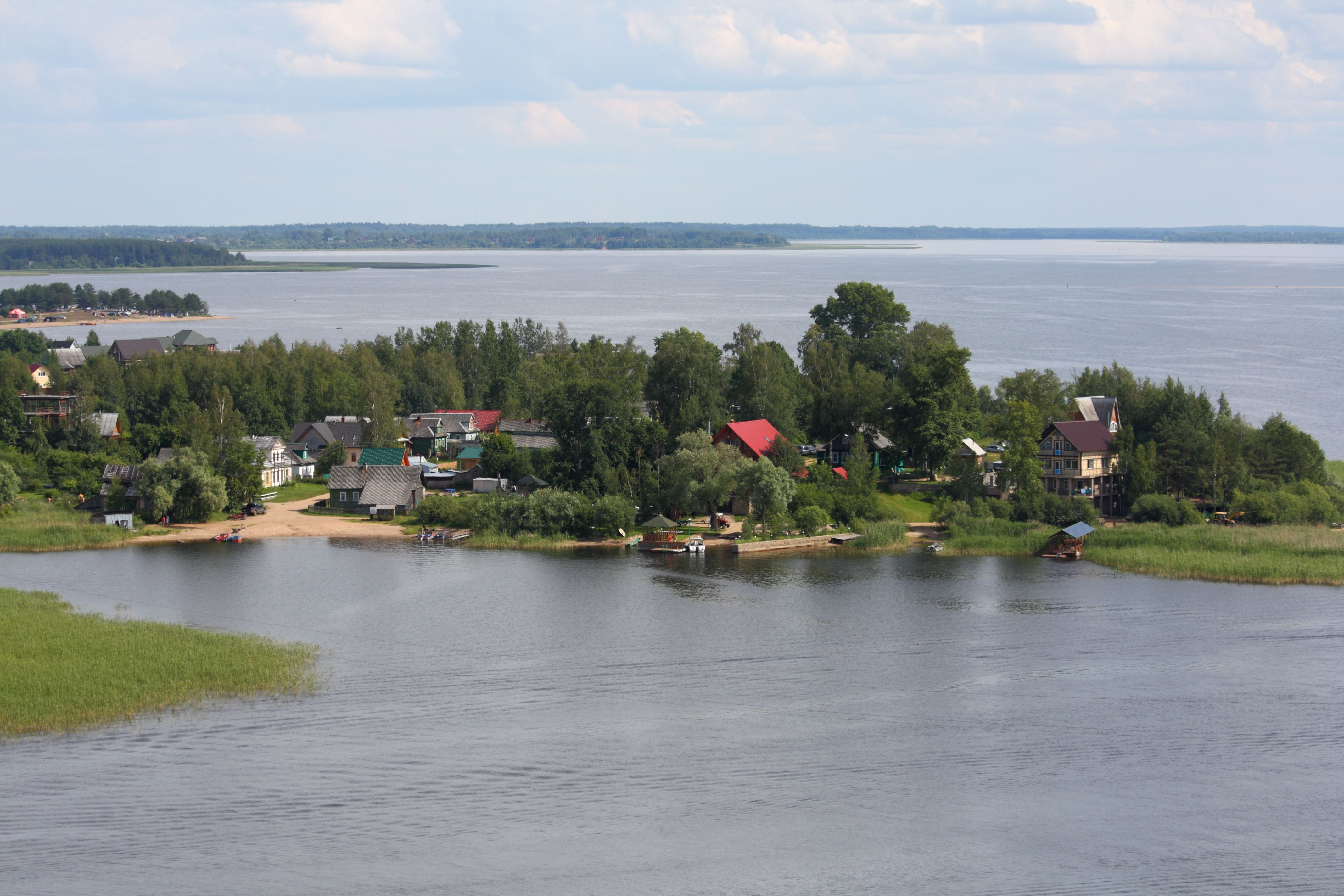 Деревня Пески. Россия, Тверская область, Осташковский район)